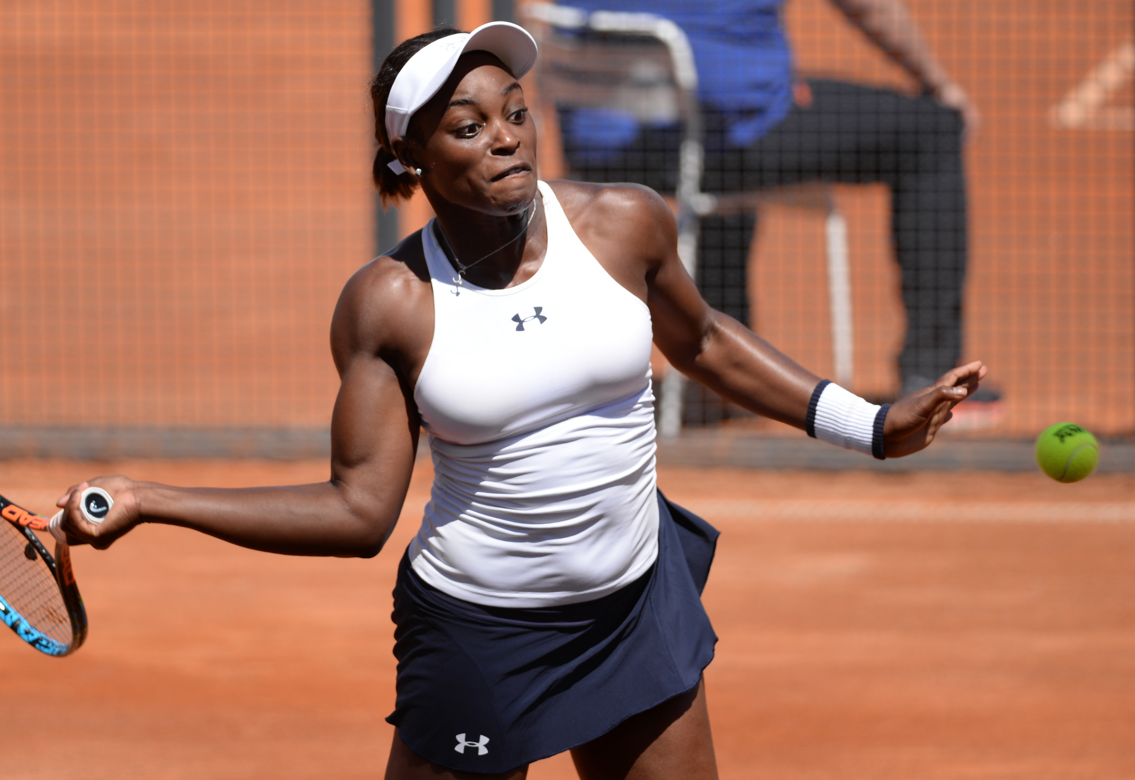 Sloane Stephens